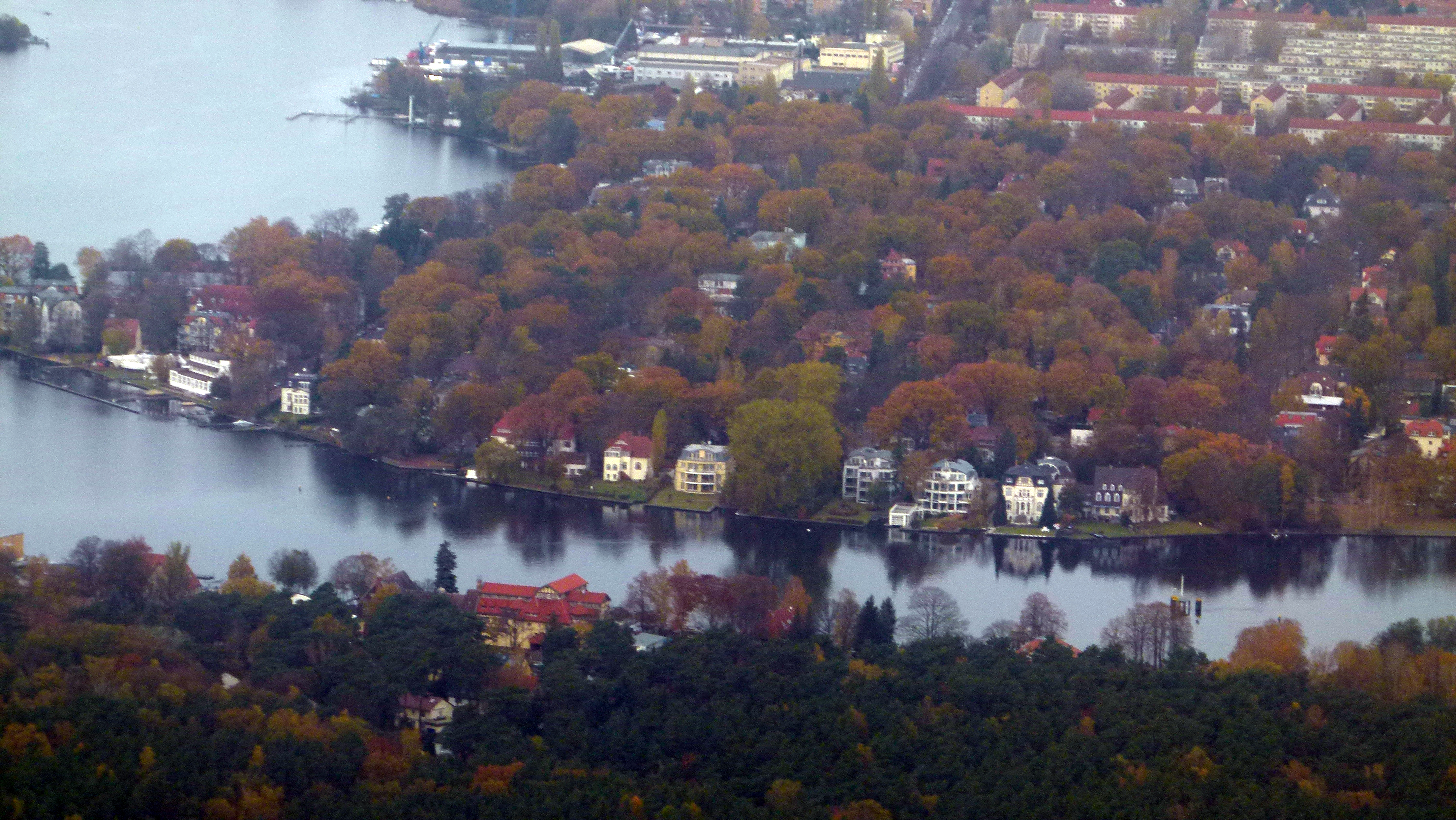 Blick auf Berlin-Wendenschloss vom Flugzeug aus